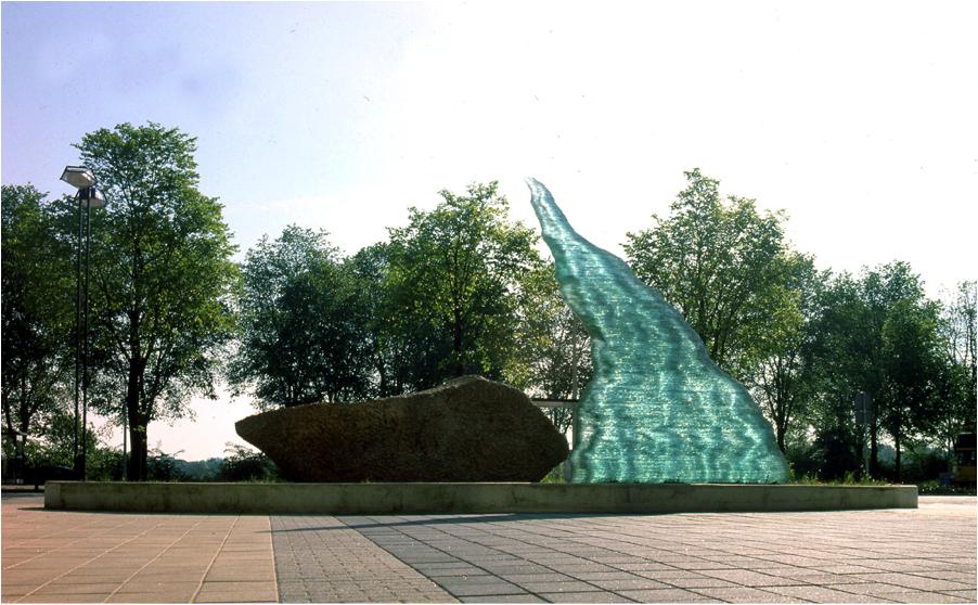 Senza Parole is een kunstwerk van Bert van Loo, geplaatst in Amsterdam - Osdorp